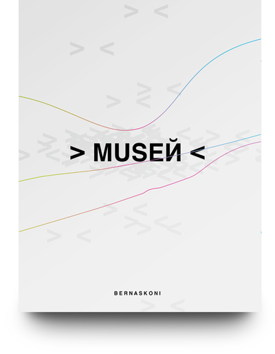 Книга MUSEЙ